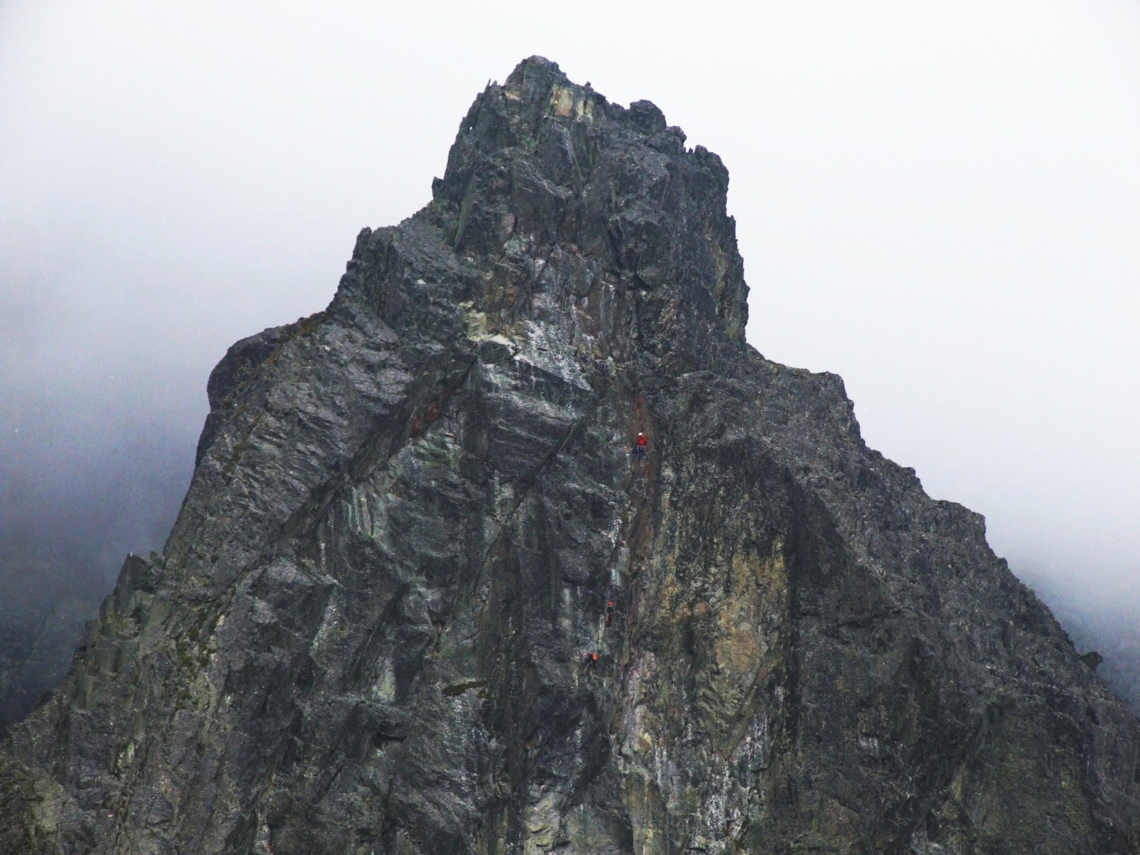 Wierzchołek Żółtej Sciany (Tatry Wysokie). Widok od schroniska Teryego